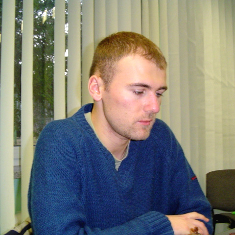 Krzysztof Jakubowski, Poraj 2003